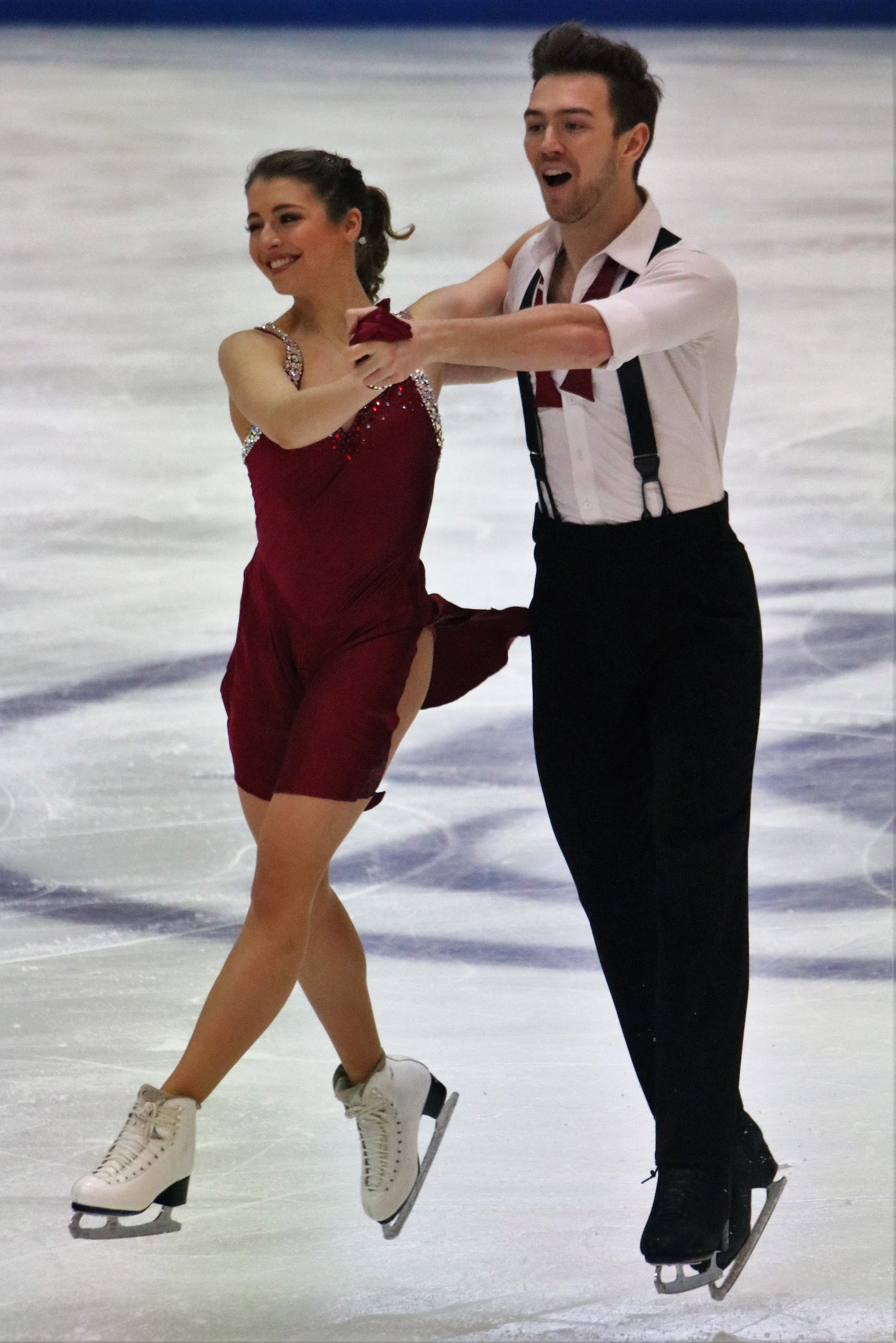 Робин Твидейл и Джозеф Бакленд (Великобритания) на чемпионате Европы по фигурному катанию 2020